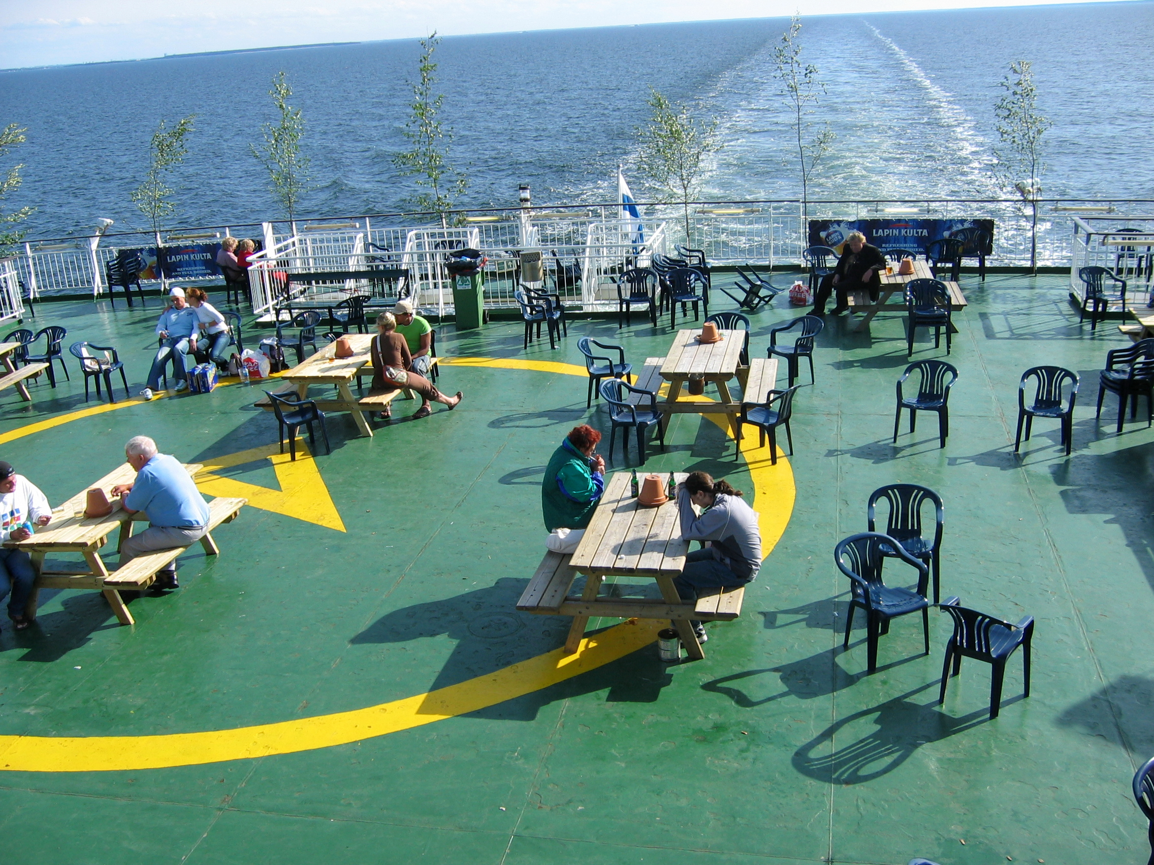 Tallinn Sommer 2007